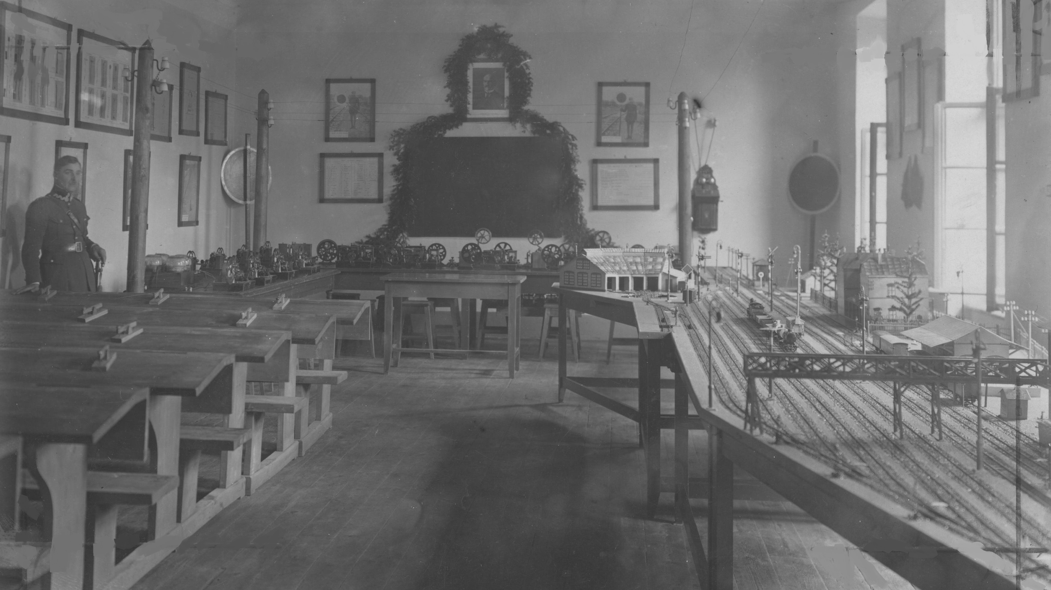 Sala wykładowa służby ruchu i telegrafu 1. Batalionu Mostów Kolejowych w koszarach 1. Pułku Saperów przy ul. Montelupich w Krakowie. Widoczny jeden z wykładowców, kpt. Ludwik Pustelnik (z lewej). Z prawej strony makieta stacji kolejowej z sygnalizacją i parowozownią. Koncern Ilustrowany Kurier Codzienny - Archiwum Ilustracji. Sygnatura: 1-W-1711